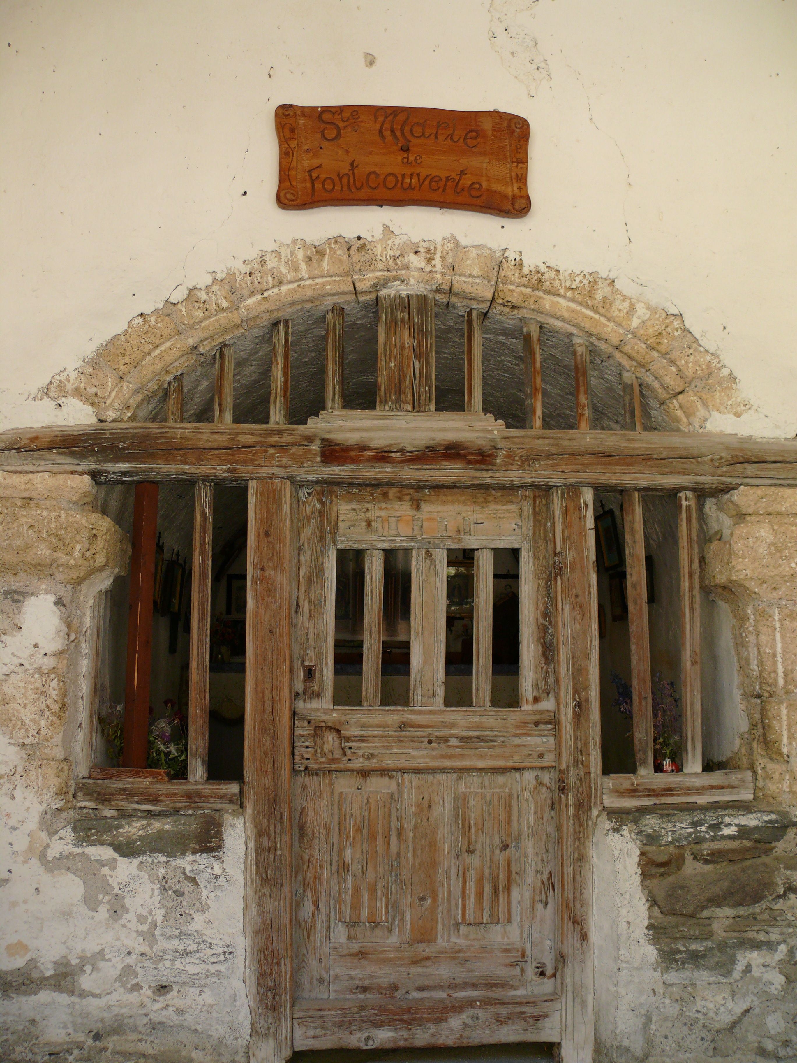 Névache - Vallée de la Clarée - Chapelle Sainte-Marie de Foncouverte